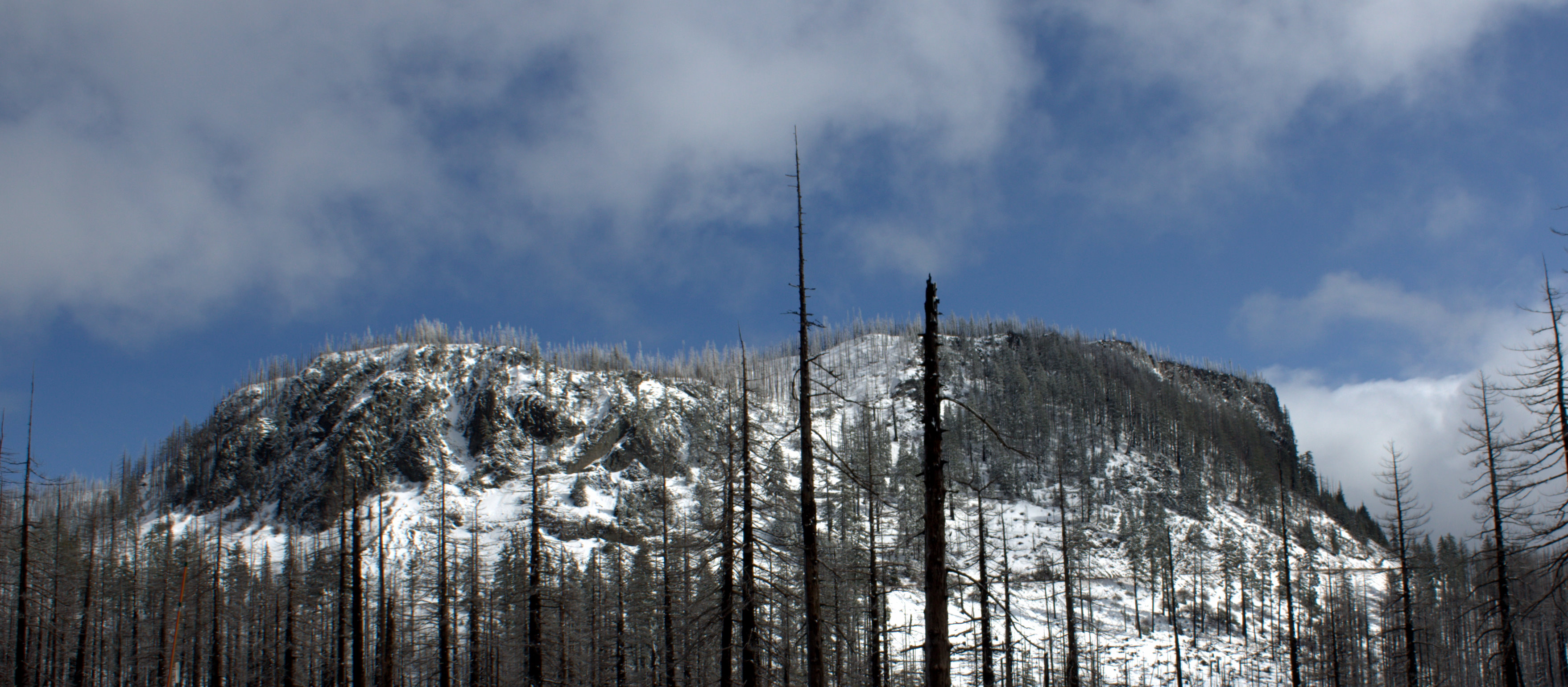 Hogg Rock, a volcano at Santiam Pass, Oregon